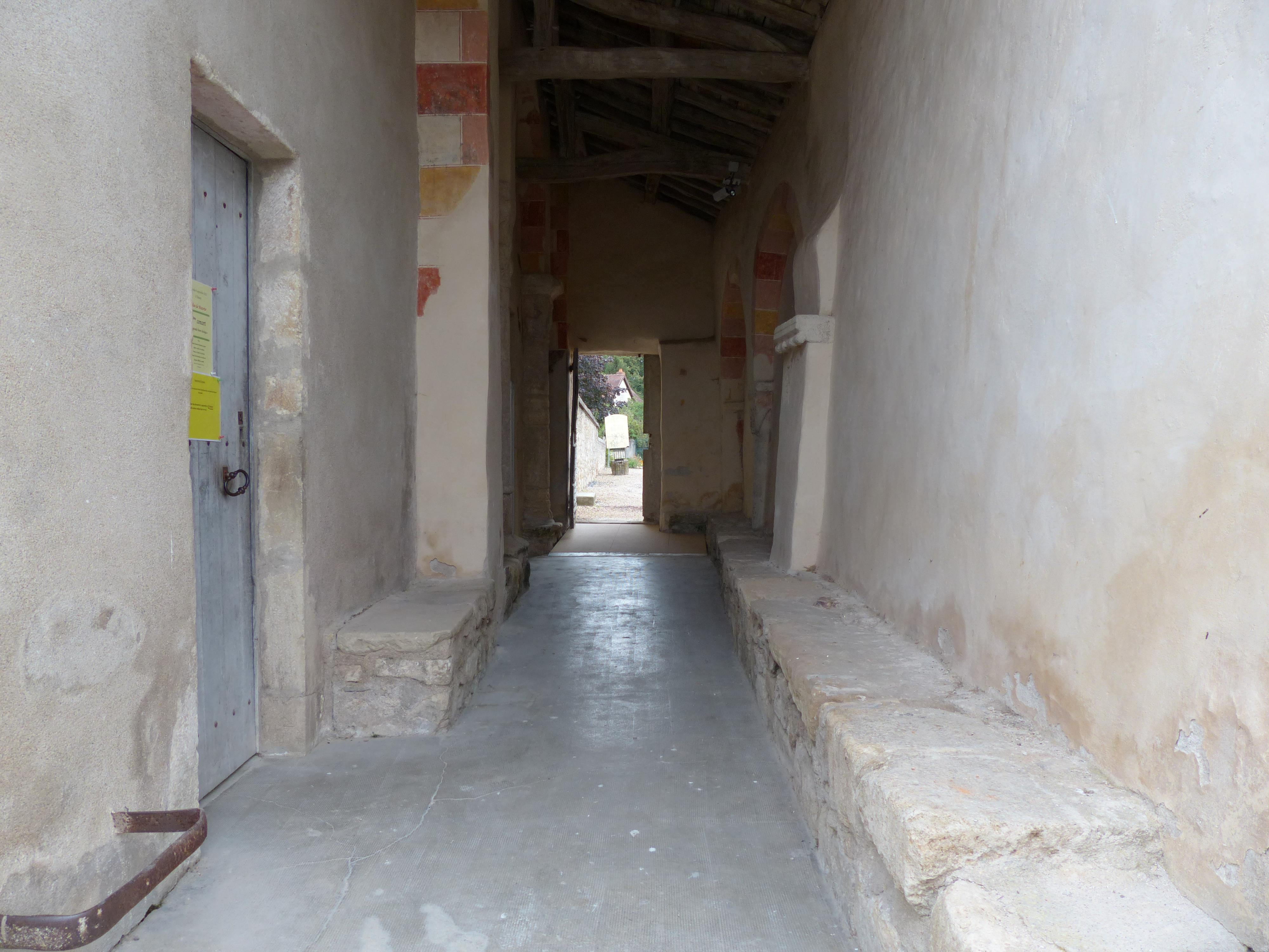 Église Saint-Saturnin de Mazerier. Intérieur du caquetoire. L'accès à l'église se trouve dans le caquetoire.